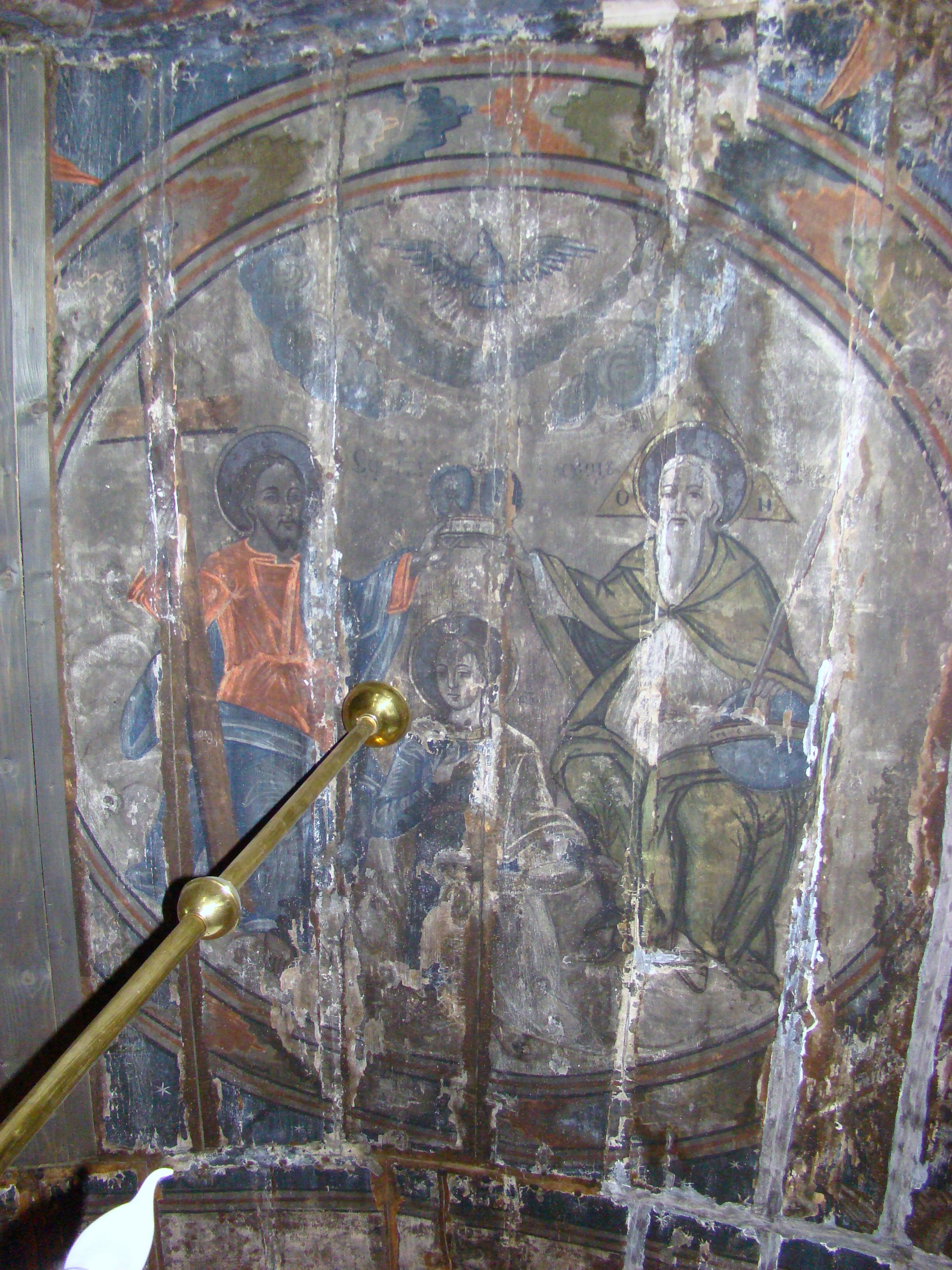 Biserica "Cuvioasa Paraschiva", sat LĂPUŞNIC; comuna DOBRA